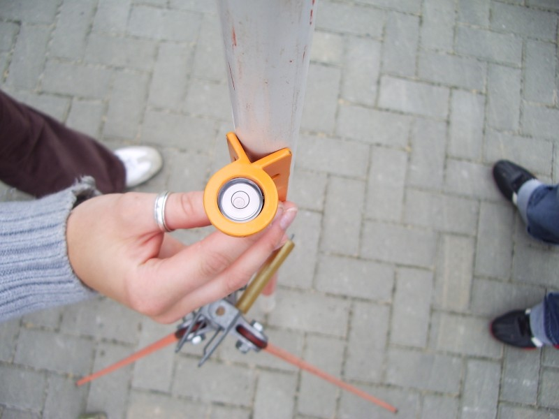 Lattenrichter mittels Dosenlibelle